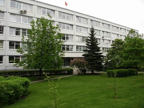 здание Министерства юстиции Республики Беларусь